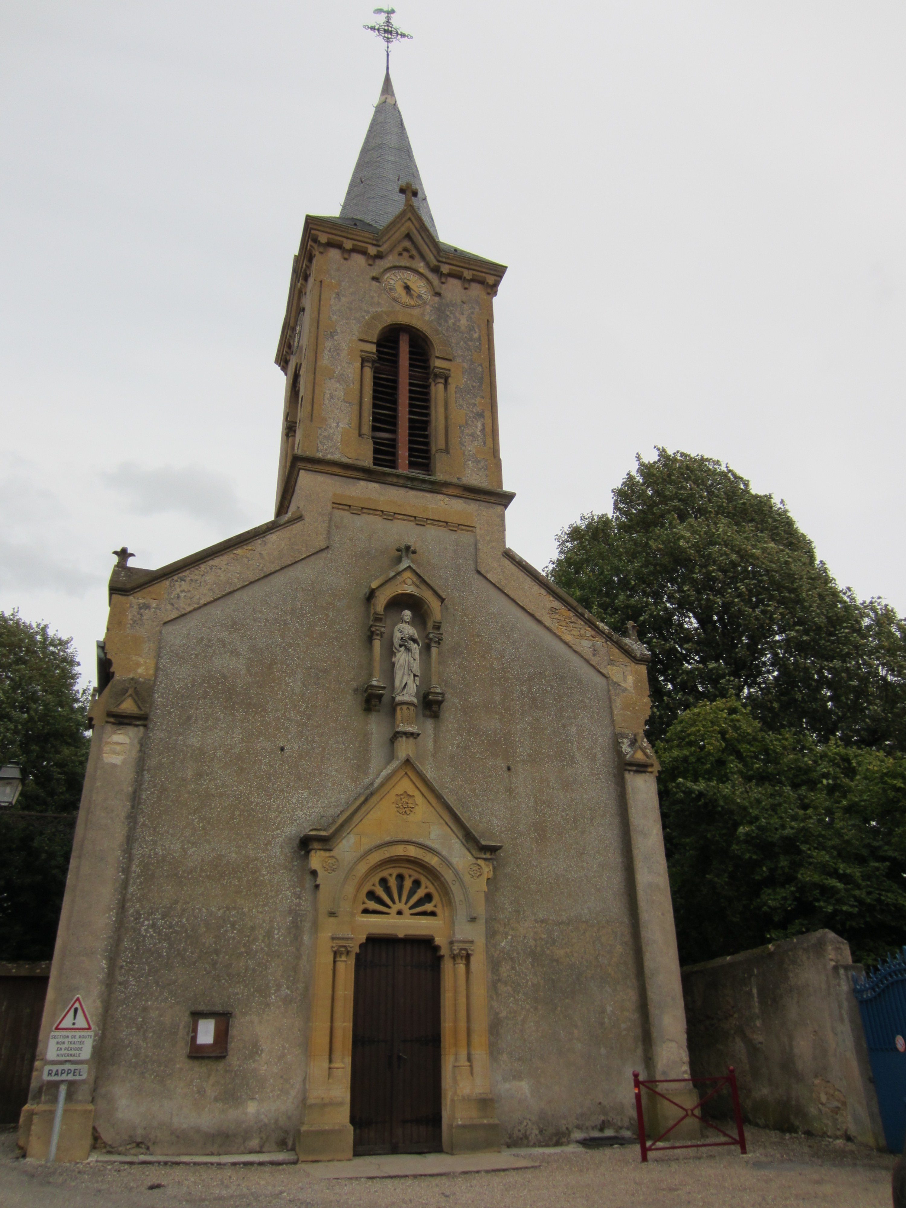 Description eglise Ste Ruffine eglise Ste Ruffine